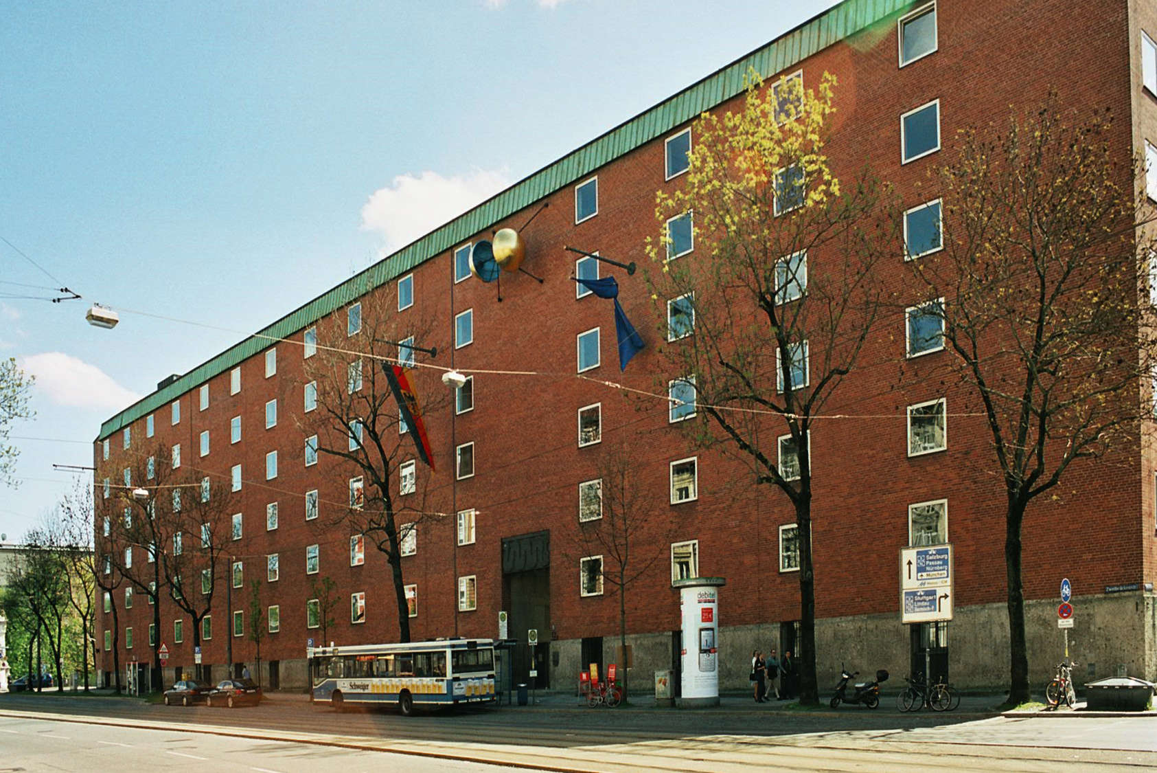 München, Deutsches Patent- und Markenamt an der Zweibrückenstraße in der Isarvorstadt